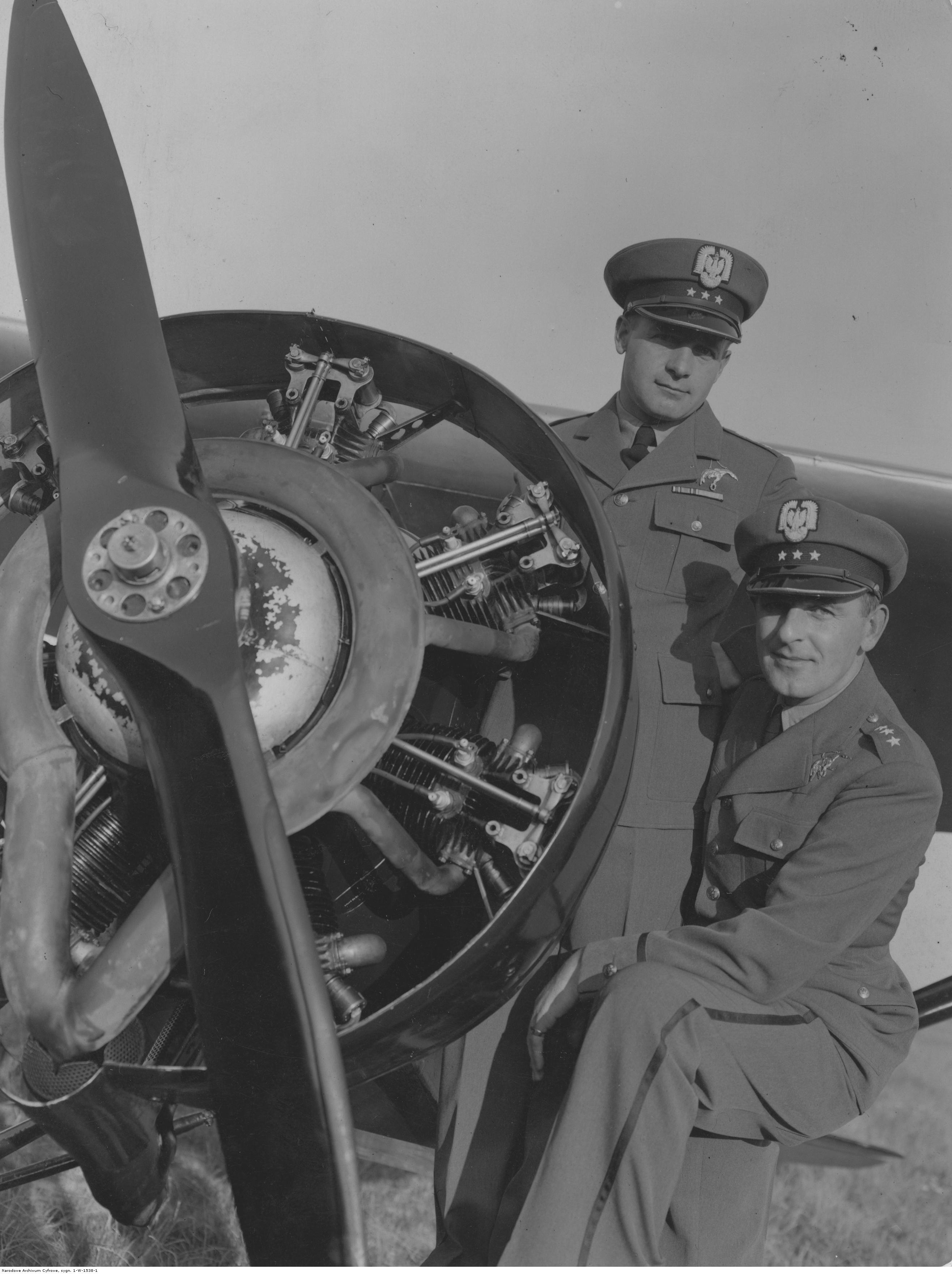 Nowe mundury polskich lotników 1936 r. Dwaj lotnicy w nowych mundurach przy samolocie. Koncern Ilustrowany Kurier Codzienny - Archiwum Ilustracji. Sygnatura: 1-W-1538-1